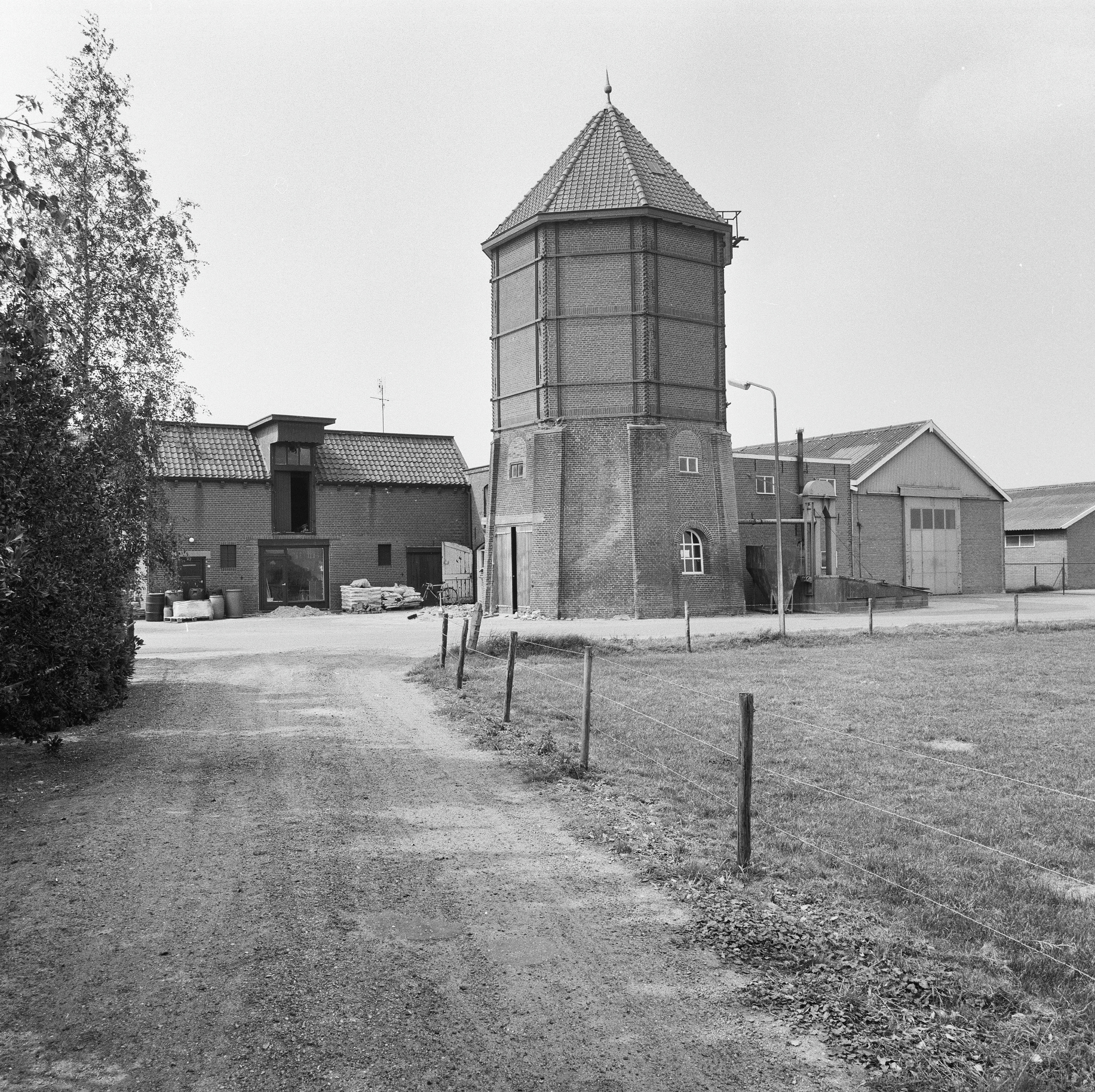 Molen G. Mentink: Exterieur OVERZICHT COMPLEX